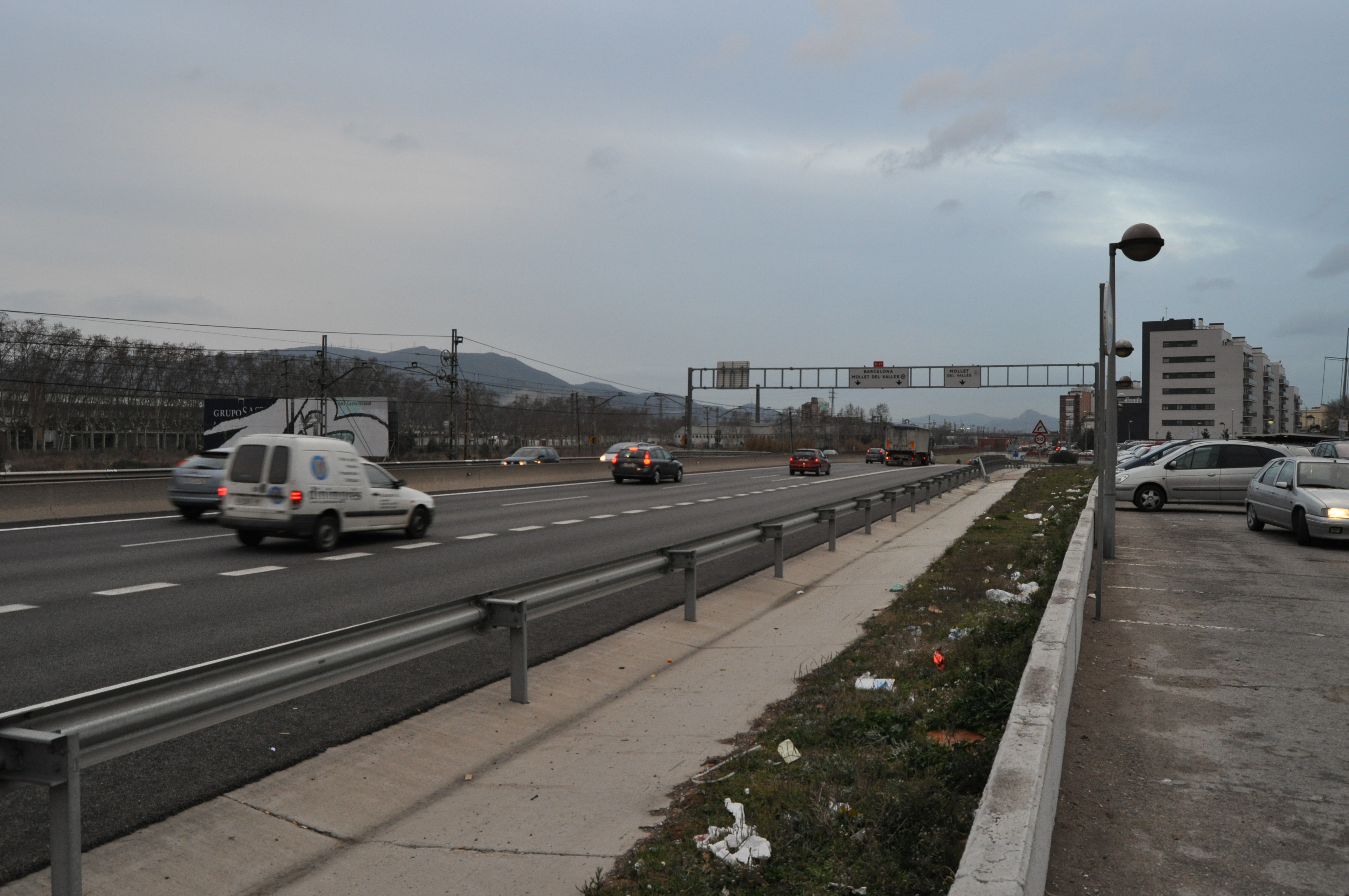 Autovía C-17 a su paso por Mollet del Vallès.